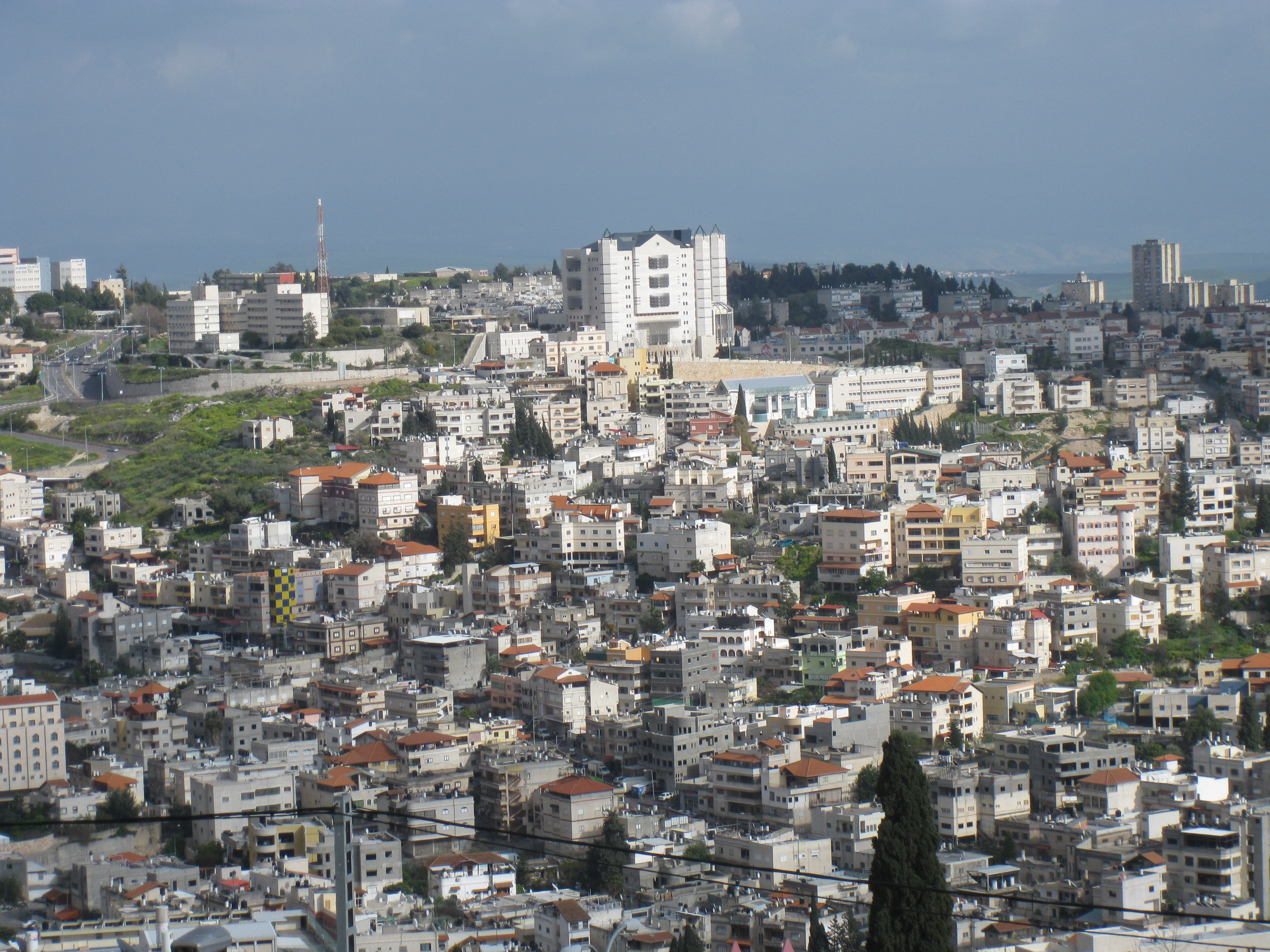 Views of Nazareth מבט פנורמי על נצרת